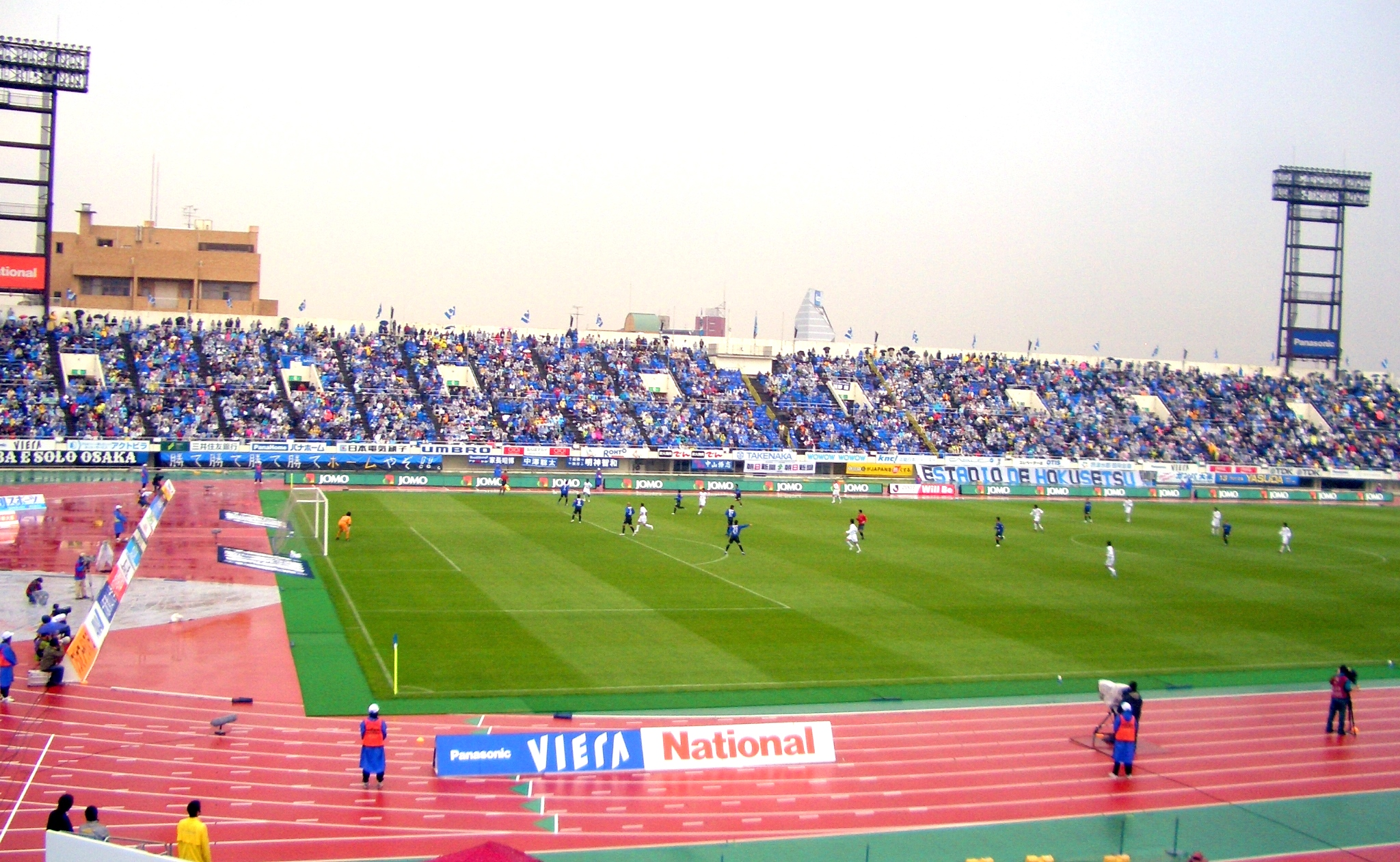 Expo '70 Stadium in Suita,Osaka,Japan.